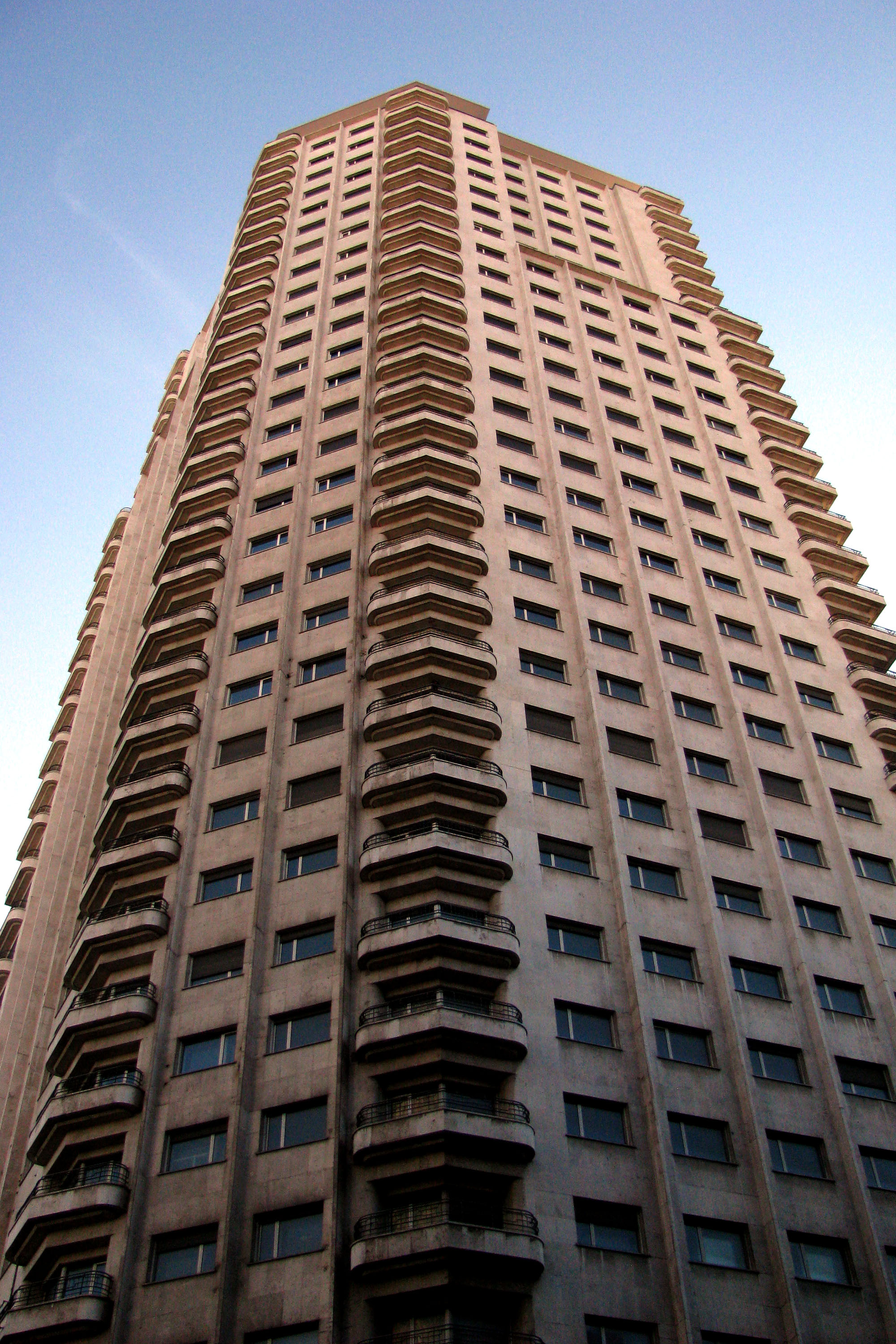 Torre de Madrid.